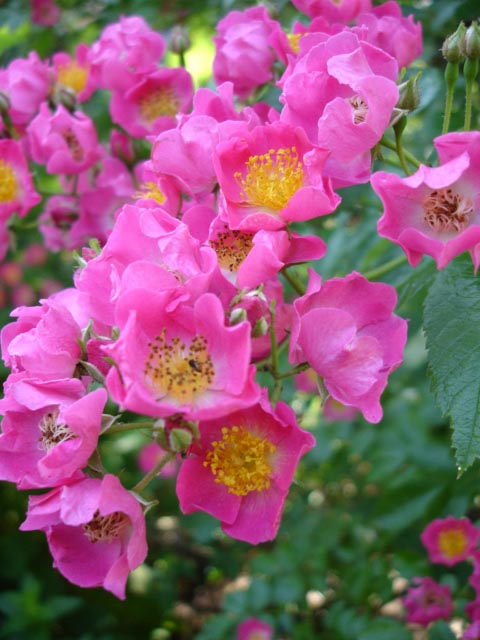 Rosa 'Maria Lisa' (Hybrid Multiflora)